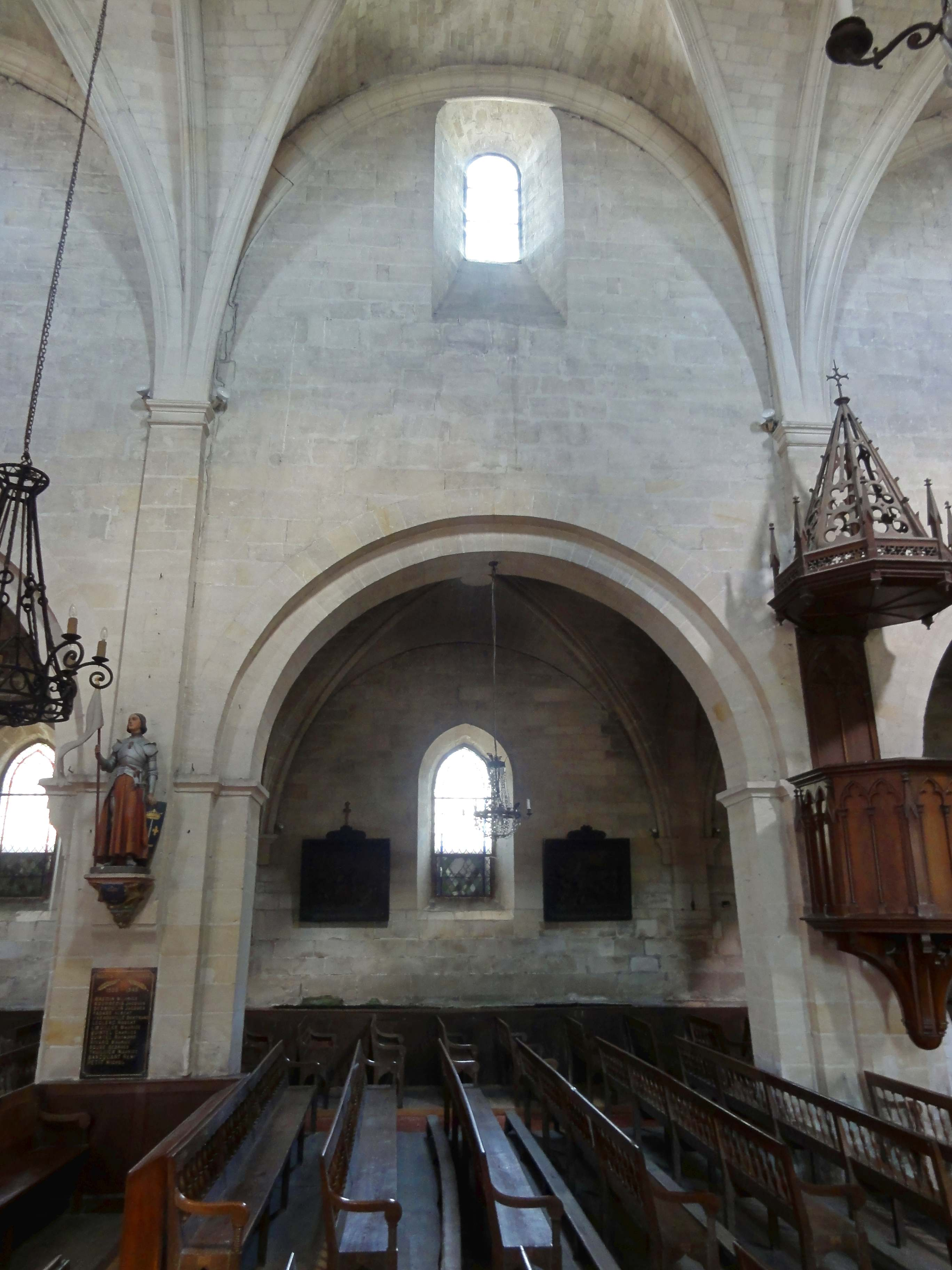 Intérieur de l'église - voir titre.